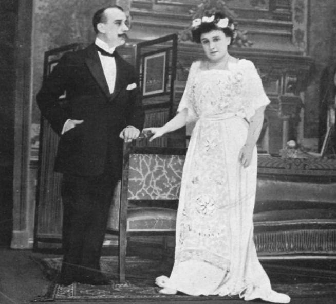 María Guerrero y Fernando Díaz de Mendoza en una escena de la obra de teatro Amores y amoríos, de los Hermanos Álvarez Quintero